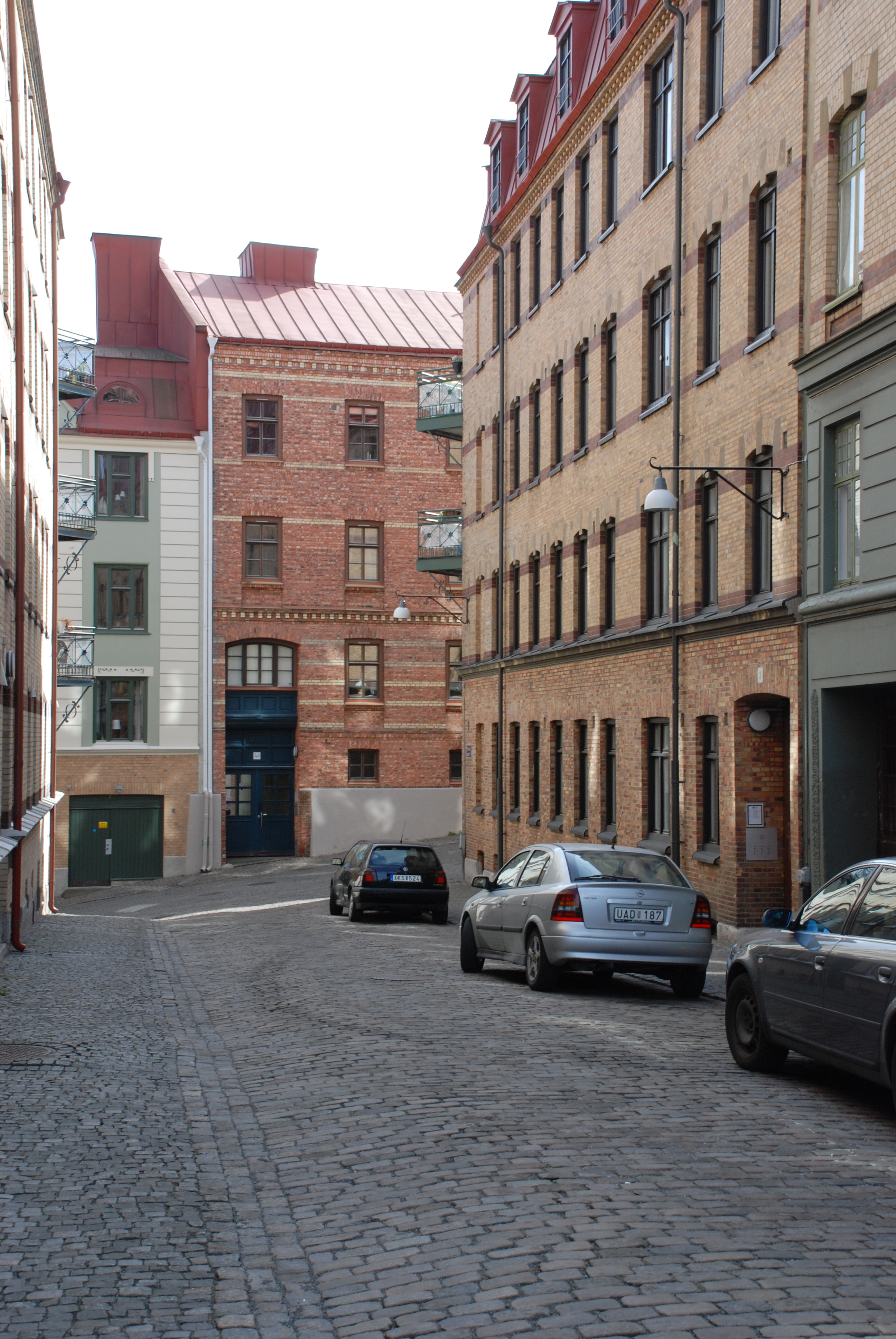 Mjölnaregatan på Kvarnberget i stadsdelen Nordstaden i Göteborg.